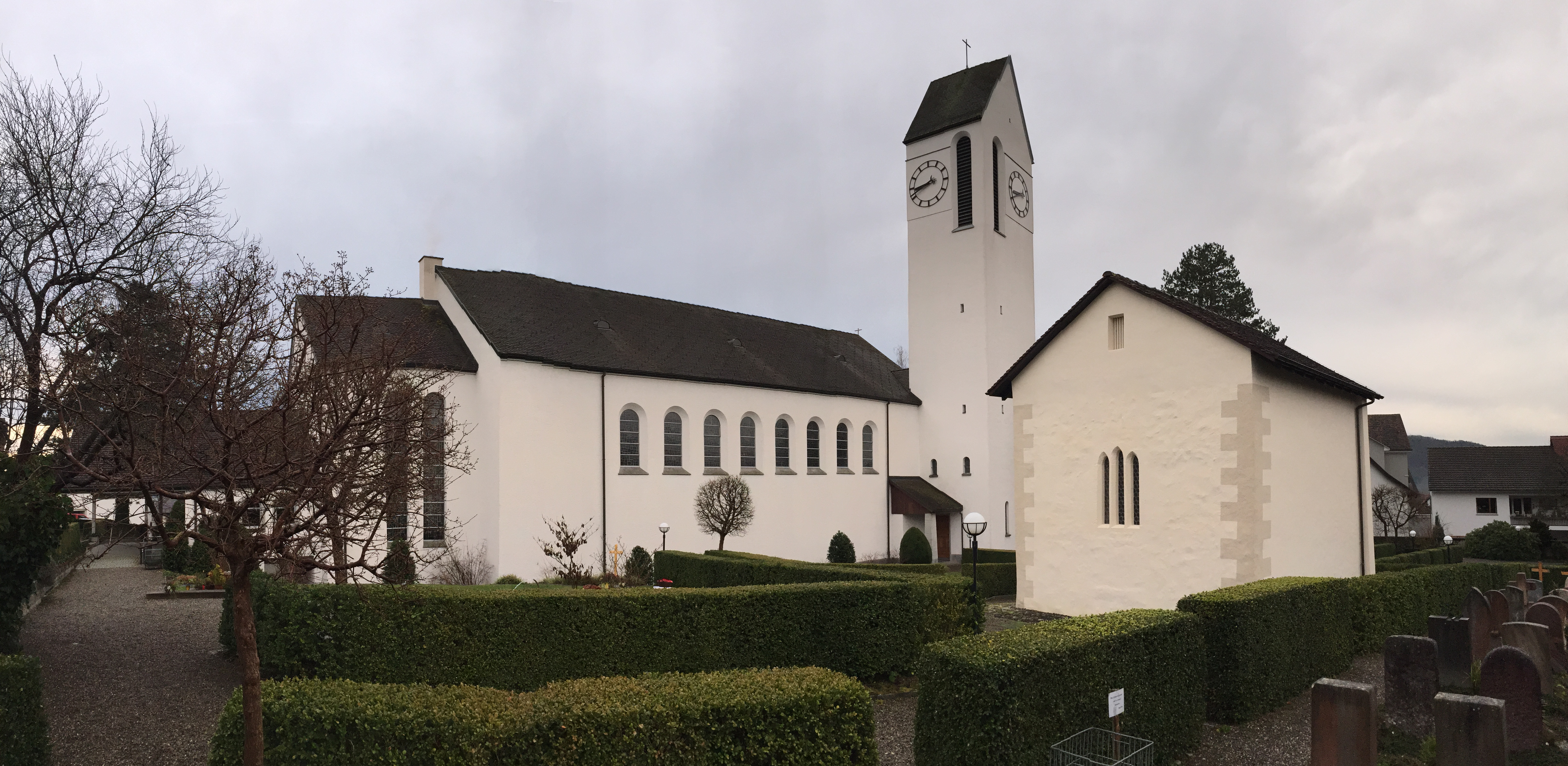 Pfarrkirche St. Leodegar (Birmenstorf)